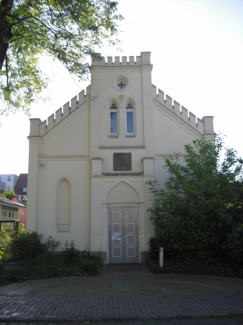 Synagoge der jüdischen Gemeinde Oldenburg und ehemaliges (erstes) Bethaus der Baptisten. Bei diesem Kirchengebäude handelt es sich um einen frühen Nachbau des Bethauses der Baptisten in Jever.